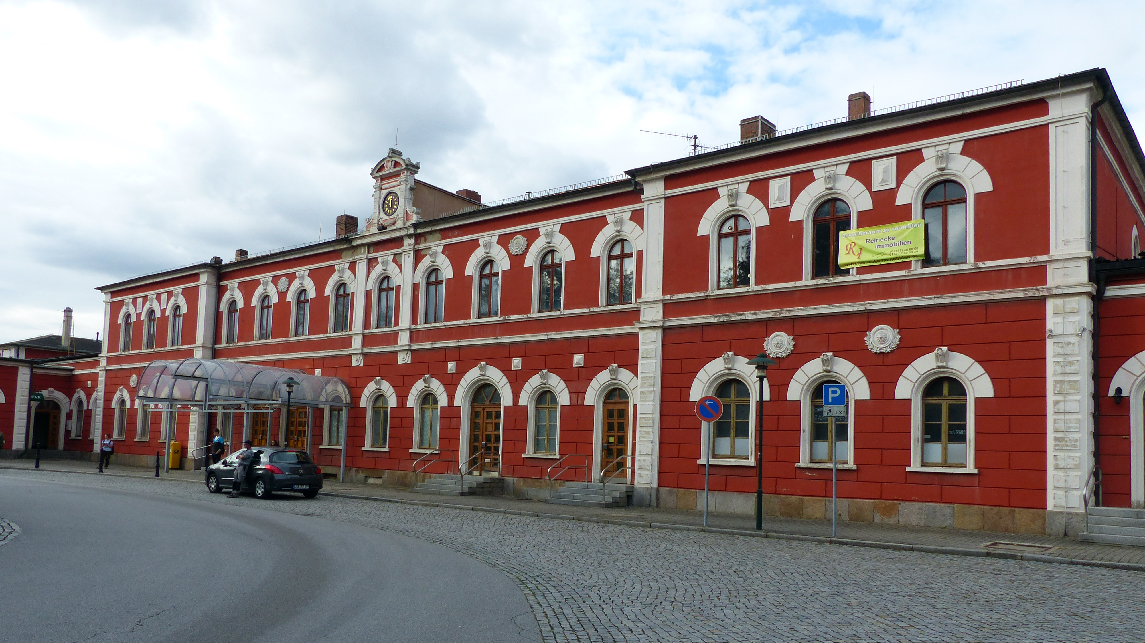 Bahnhof Löbau, Sachsen